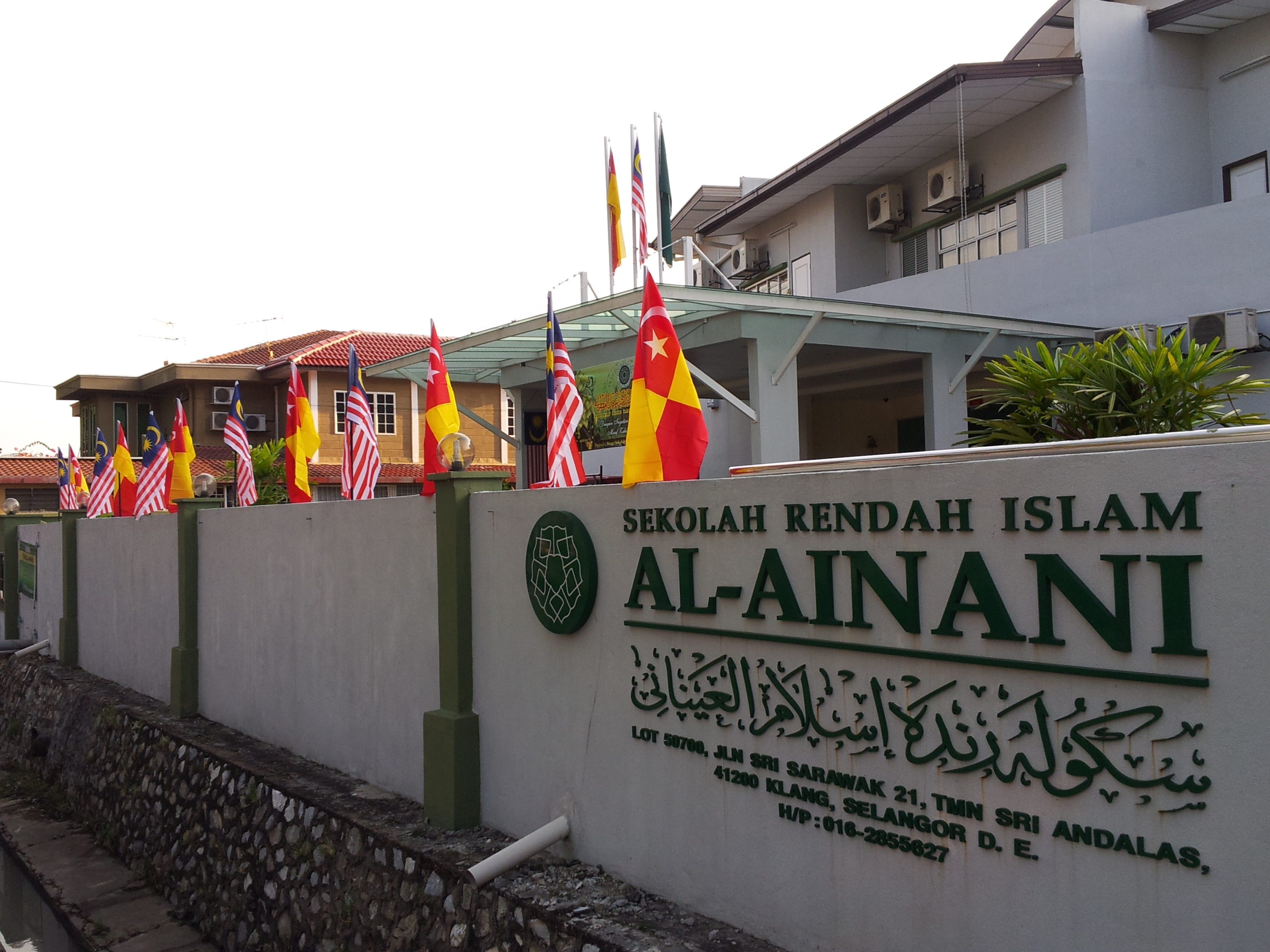 Sekolah Rendah Islam Al Ainani Taman Seri Andalas Klang.